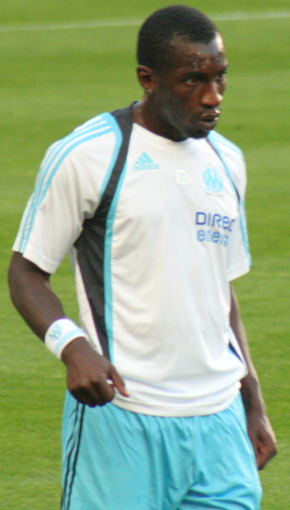 Mamadou Niang à l'échauffement lors du match Stade rennais - Olympique de Marseille le 22/08/2009